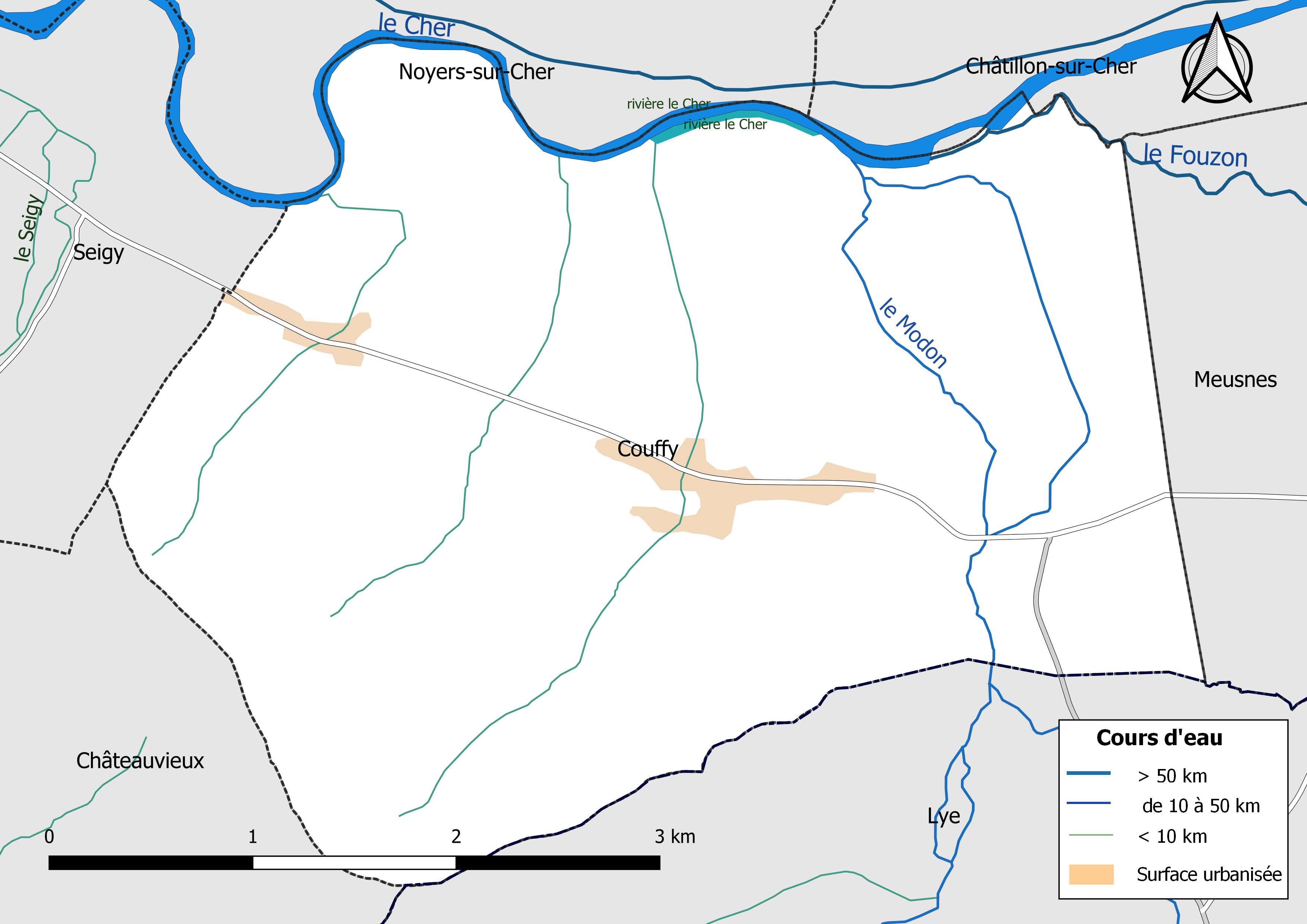 Carte du réseau hydrographique de la commune de Couffy (Loir-et-Cher, France).